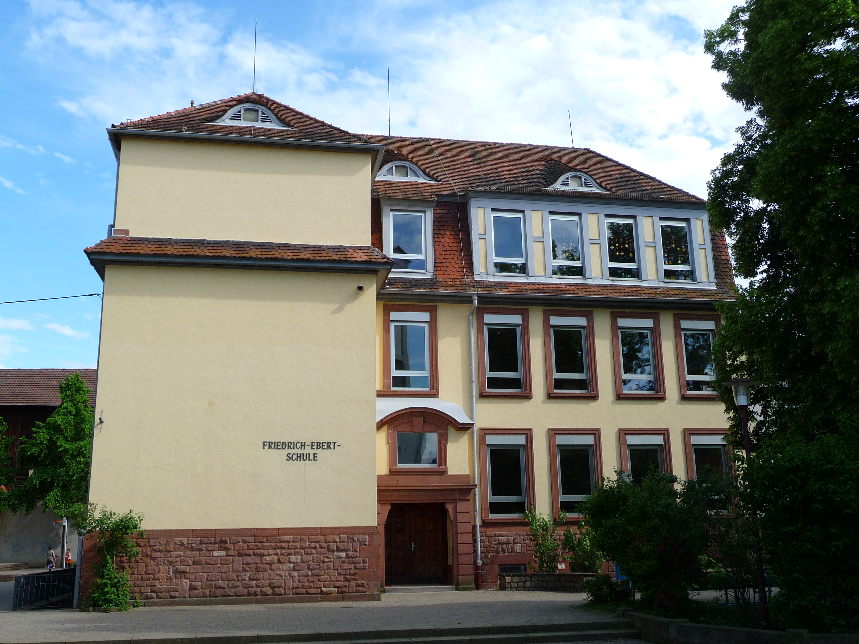 Friedrich-Ebert-Grundschule in Oftersheim (Rhein-Neckar-Kreis, Deutschland); erbaut 1911